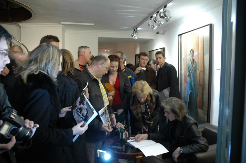 Séance de signature des catalogues